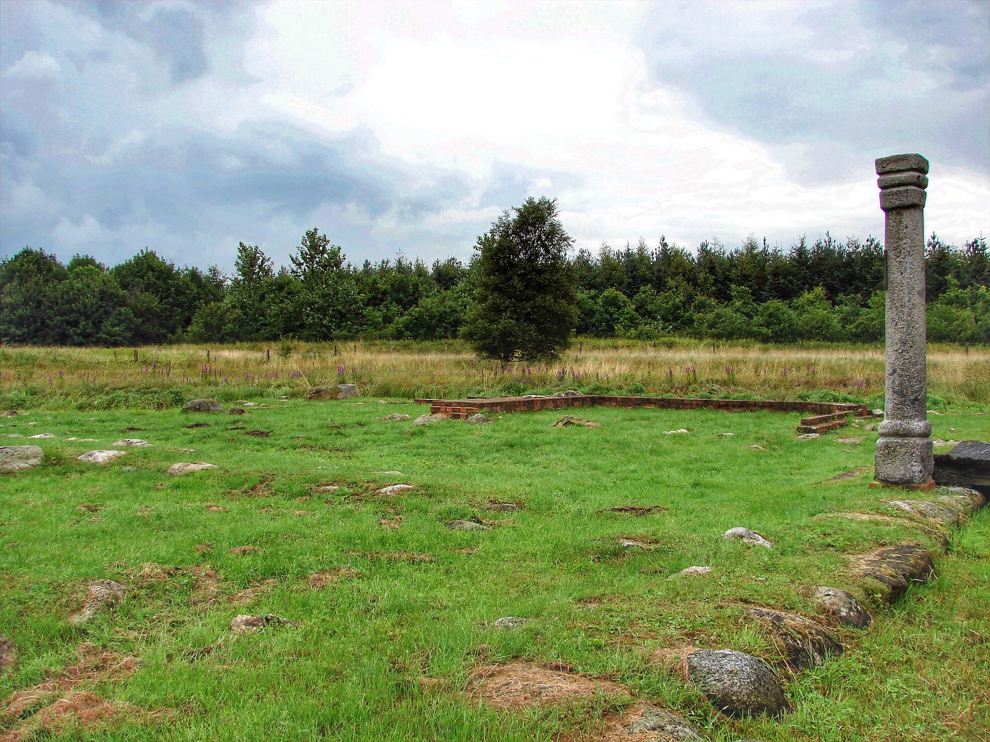 Ruiner af Hertug Hans' (1521-1580) lystslot Lusthus Thom Gronenhagen (Grøngård Slot), ved Tønder, Sønderjylland